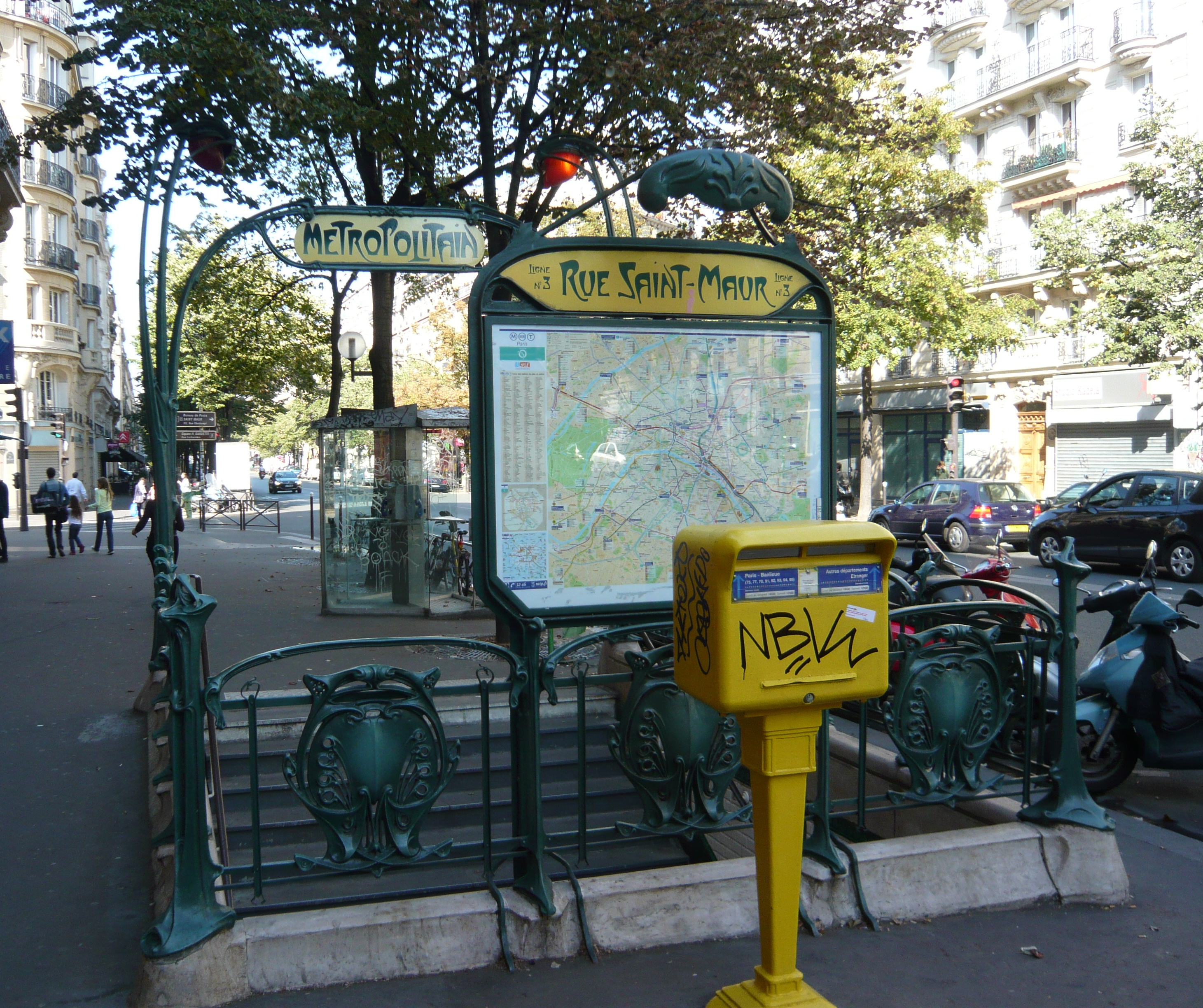 Edicule Guimard Métro Rue St-Maur